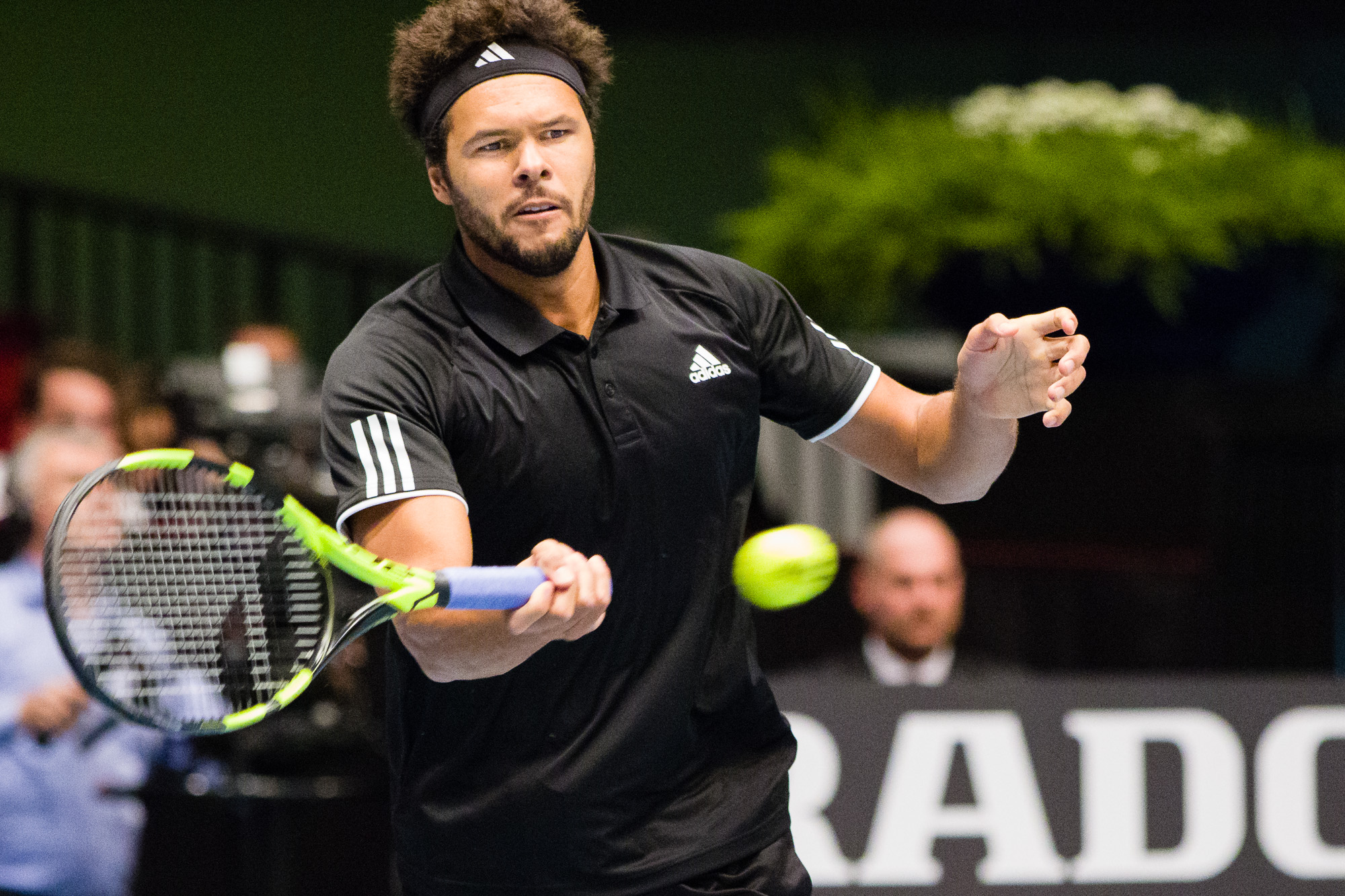 Tie Break Tens in Wien am 23.10.2016 (side event der Erste Bank Open ATP World Tour 500 2016)